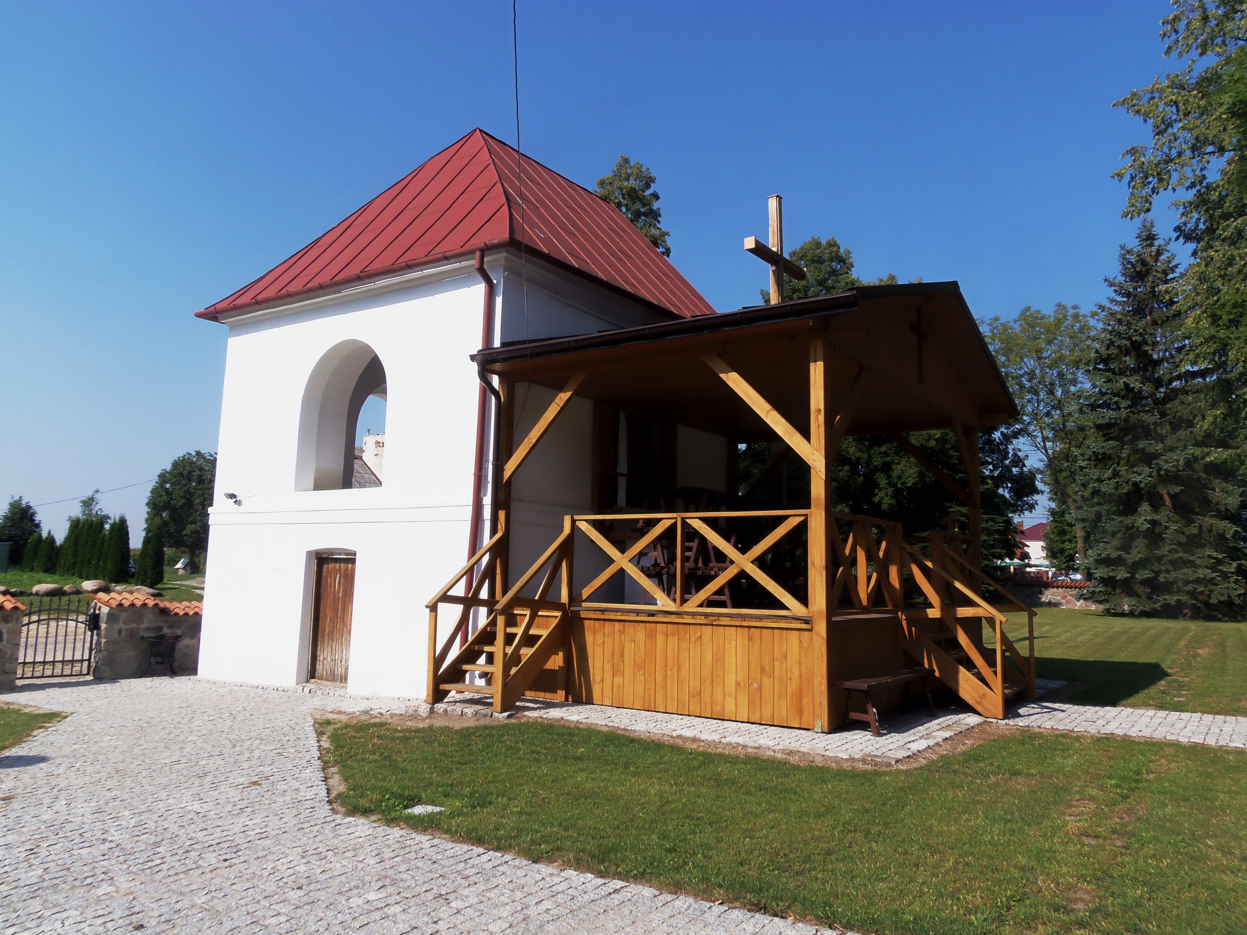 Dzwonnica klasycystyczna z 1816 r. przy kościele parafialnym w Ostrożanach